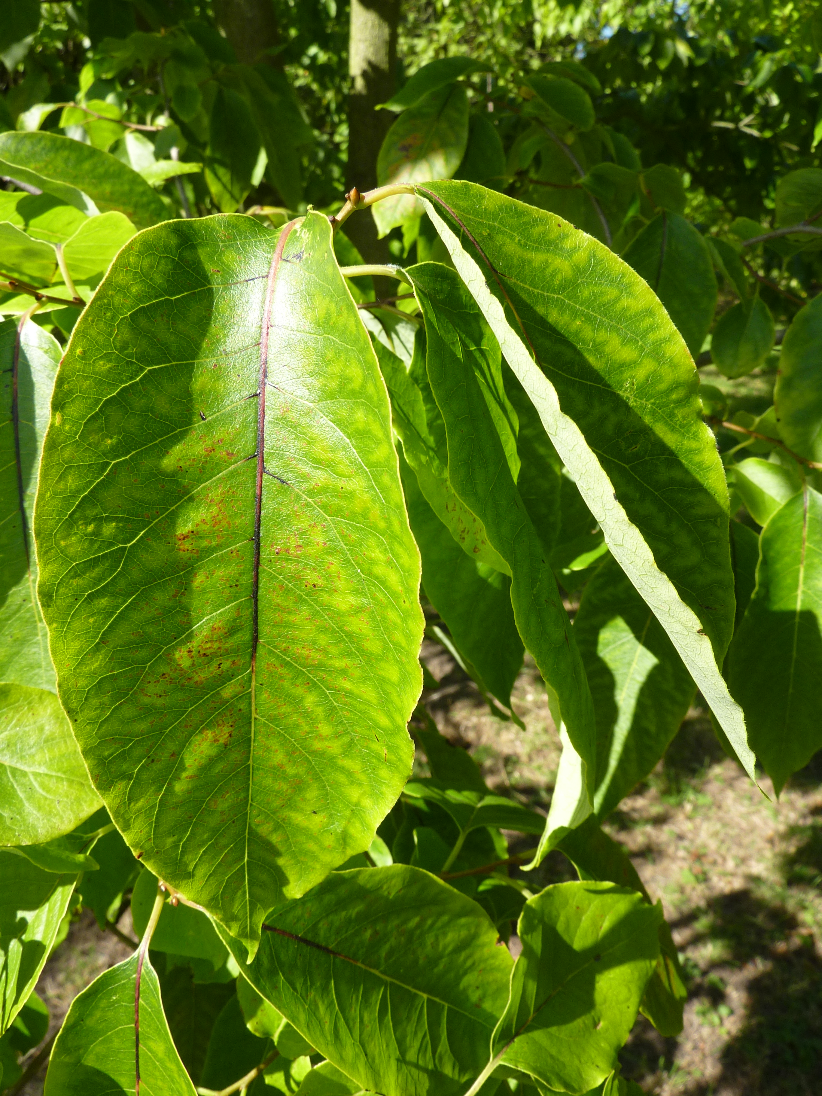 Diospyros virginiana L. - common persimmon - leaves